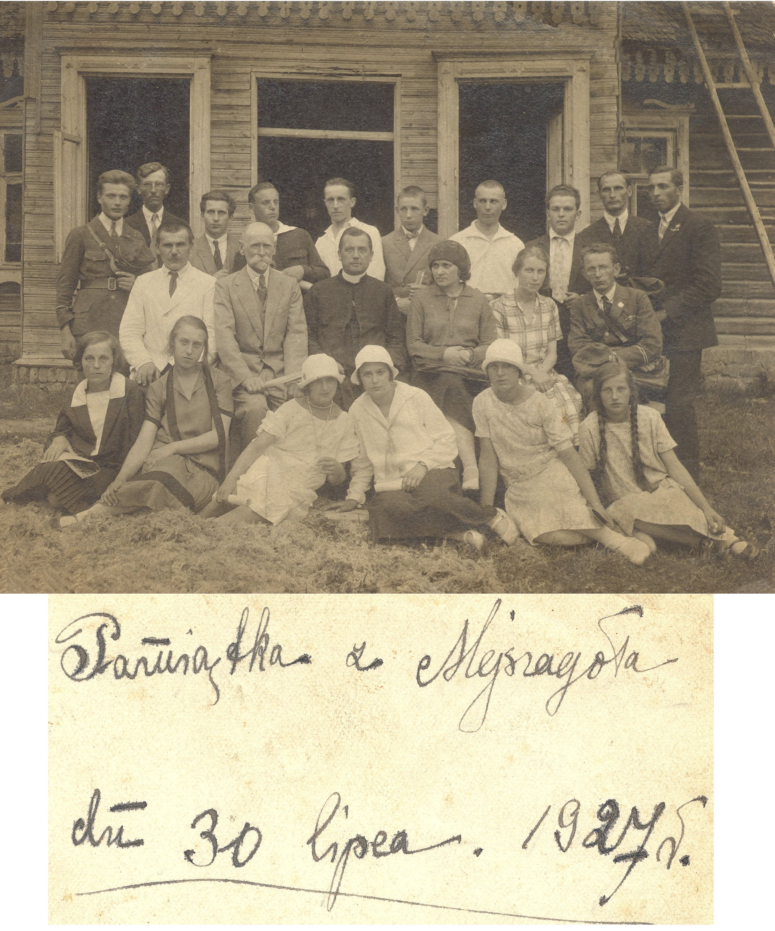 Polska organizacja młodzieżowa w Mejszagole